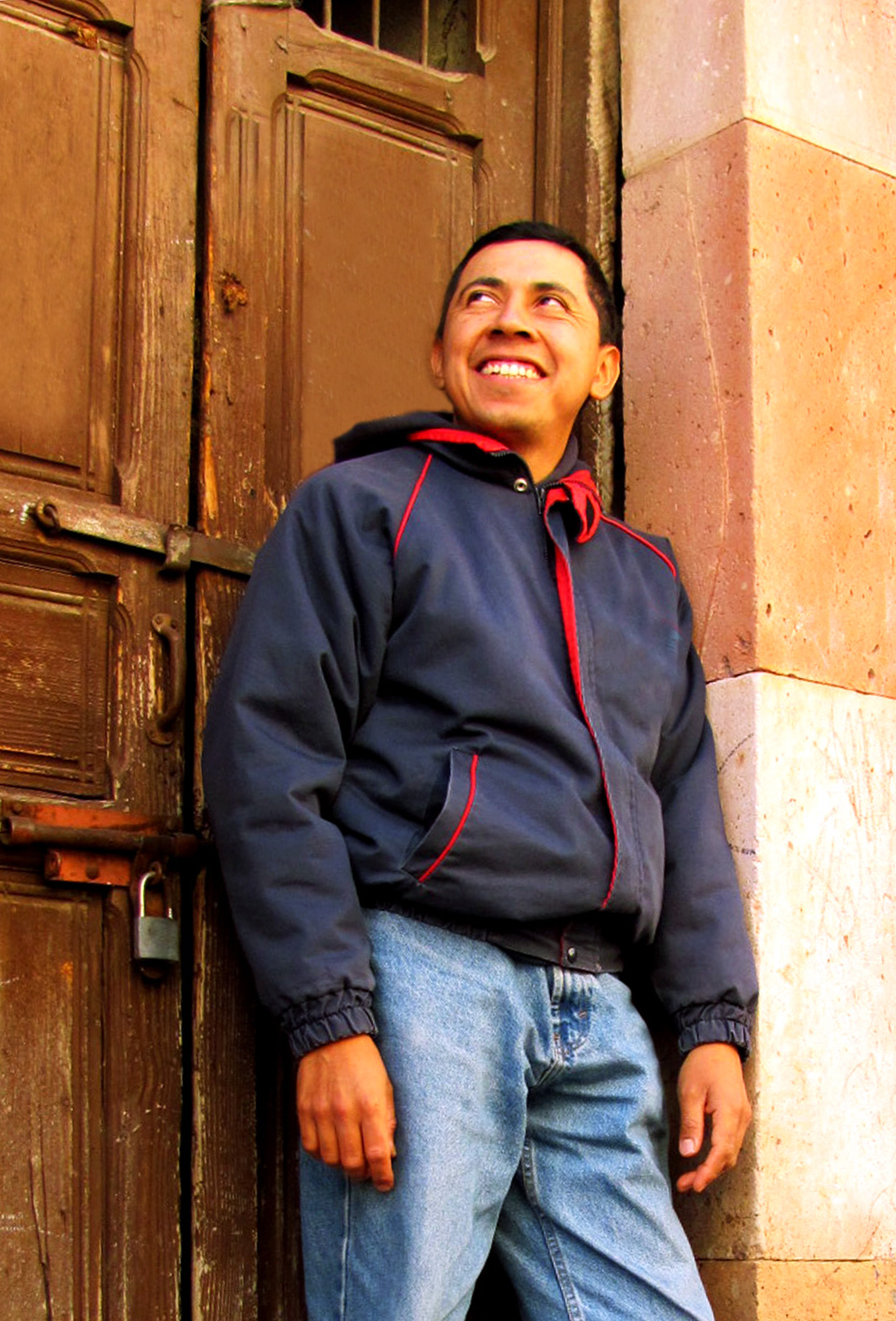 Artista plástico.